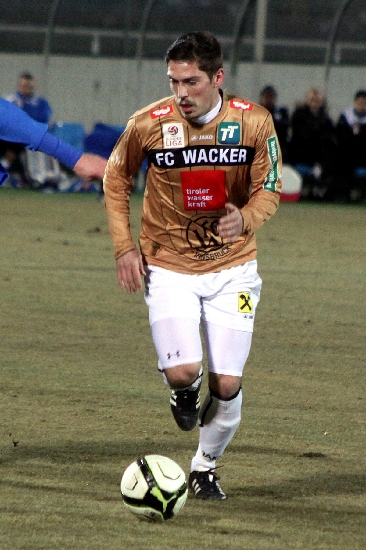 Meisterschaftsspiel der österreichischen Bundesliga: SC Wiener Neustadt gegen FC Wacker Innsbruck am 25. Februar 2012 (0:0) im Wiener Nweustädter Stadion. - Das Foto zeigt de: Miran Burgič (FC Wacker Innsbruck).